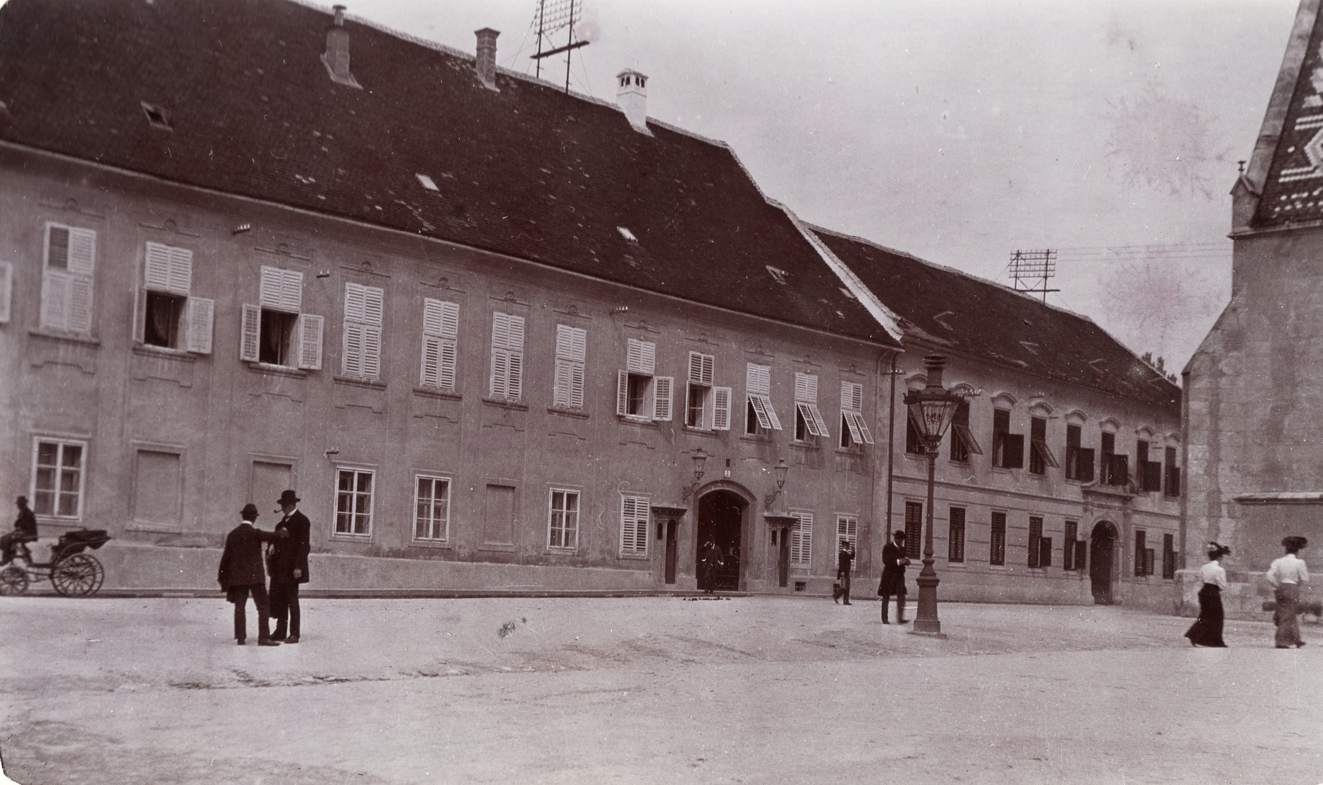 Szent Márk tér (Trg svetog Marka), Báni palota (Banski dvori). Location: Croatia, Zagreb Tags: street view, lamp post, carriage, venetian blind Title: Szent Márk tér (Trg svetog Marka), Báni palota (Banski dvori).